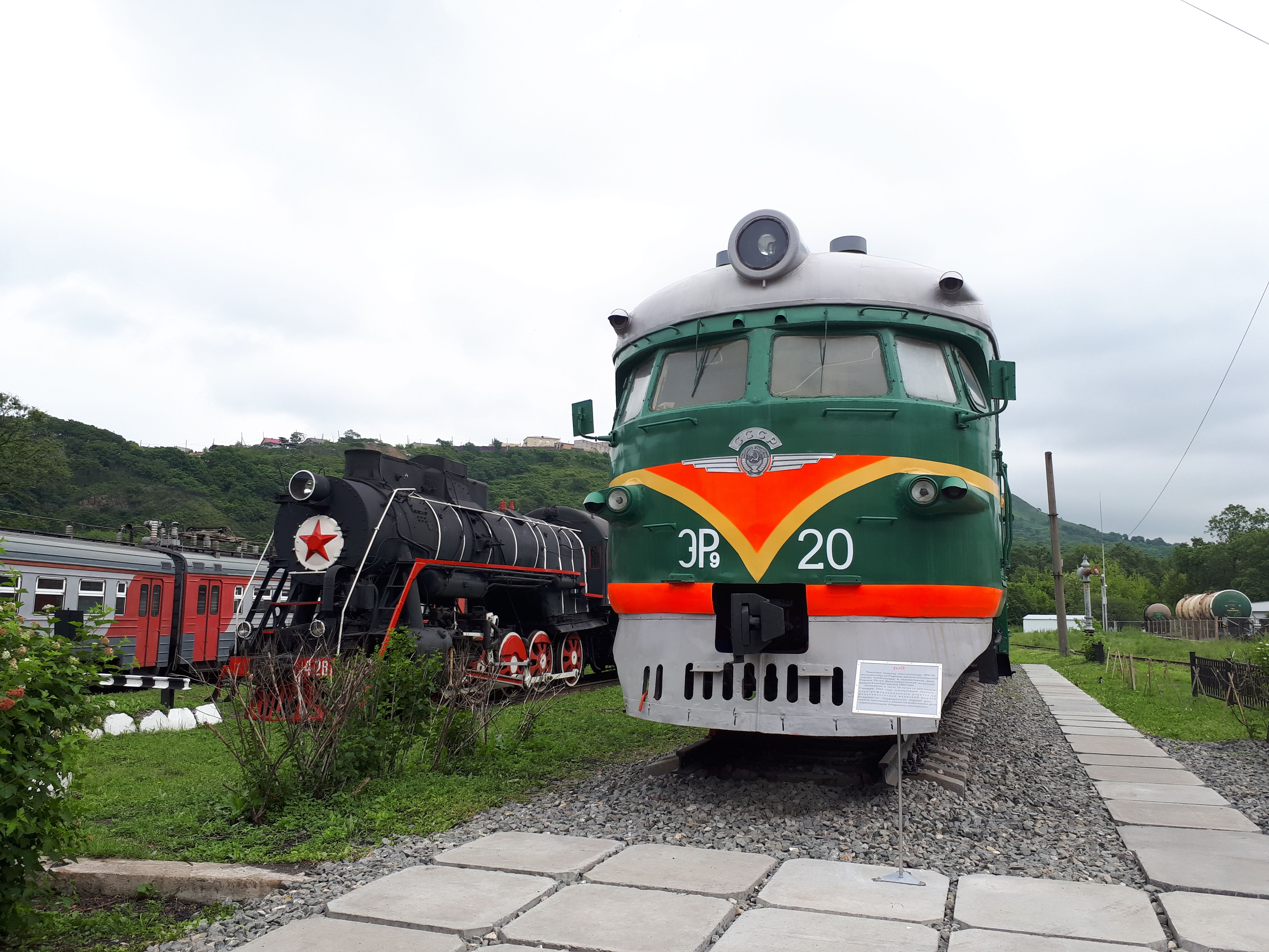 Паровоз Л-4287 построен в 1951 на Ворошиловградском заводе имени Октябрьской революции. В настоящее время эксплуатируется на парадах и во время празднования Дня Победы. ЭР9-20 в депо Первая Речка установлен как памятник (реальный состав — ЭР9ПК-234). Установлен в честь 55-летия со дня начала 1 января 1963 года эксплуатации первого электрофицированного участка на Дальневосточной железной дороге Владивосток-Надеждинская, отдавая дань памяти, признания и уважения работникам депо - первопроходцам внедрения электротяги.